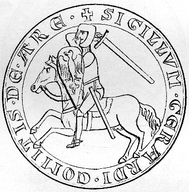 Gerard von Are